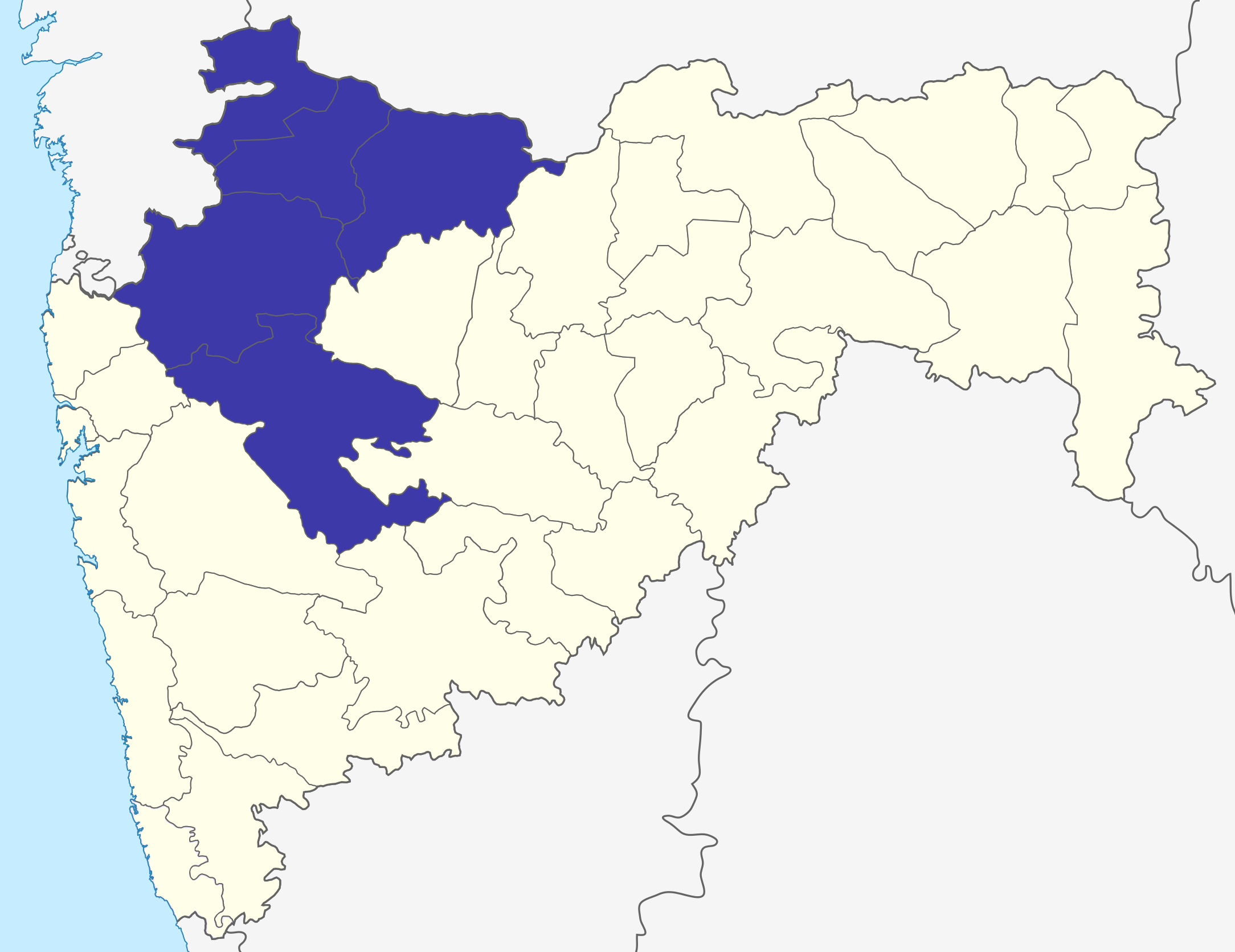 Nashik division in Maharashtra, India